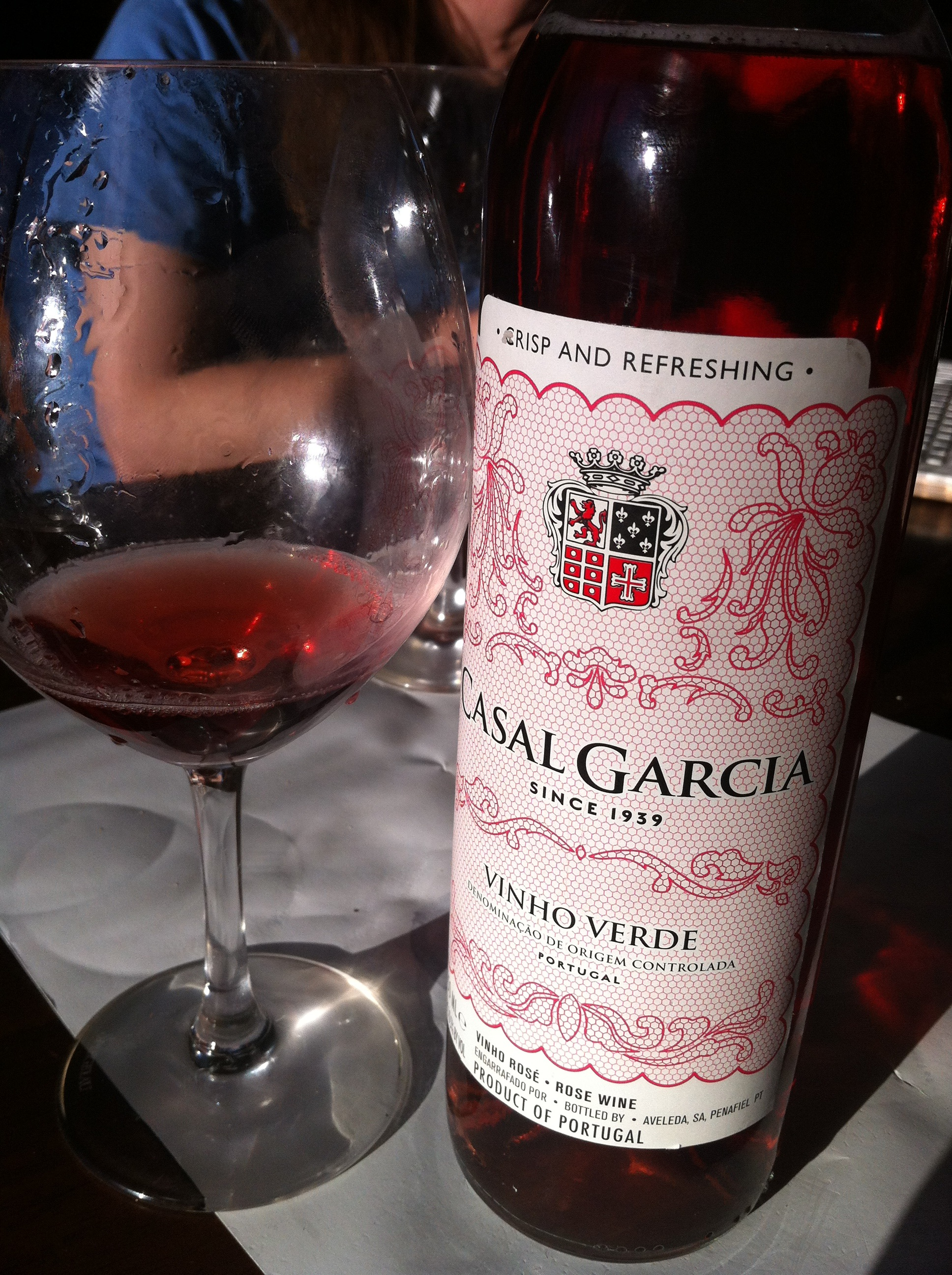 Portuguese rose wine from the Vinho Verde region made from espadeiro and padeiro.